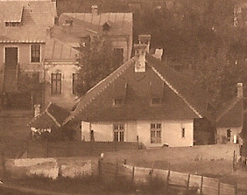 Una din locuinţele tip din primul ansamblul de locuinte sociale din strada Lânăriei, România, construite de Societatea Comunala de Locuinte Ieftine - Bucuresti la 1910 pe timpul primarului Vintilă Brătianu